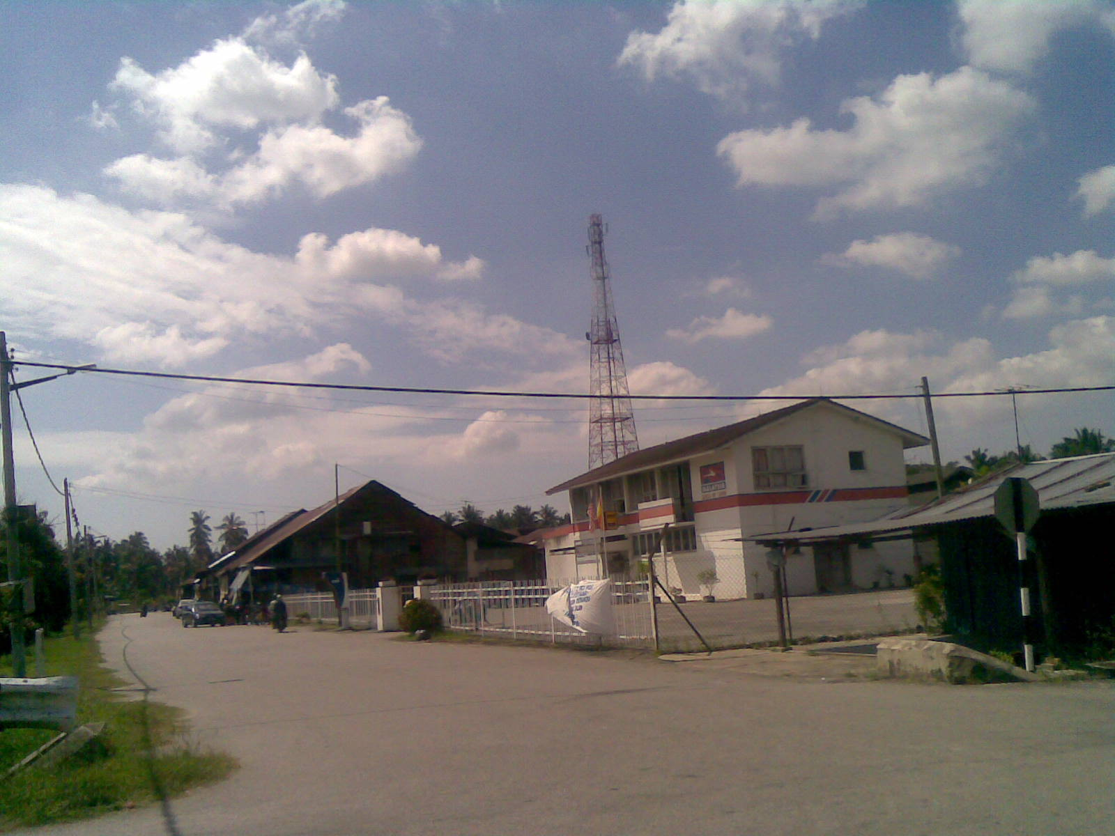 Pekan Sungai Ayer Tawar, Sabak Bernam Selangor pada 06 Desember 2007